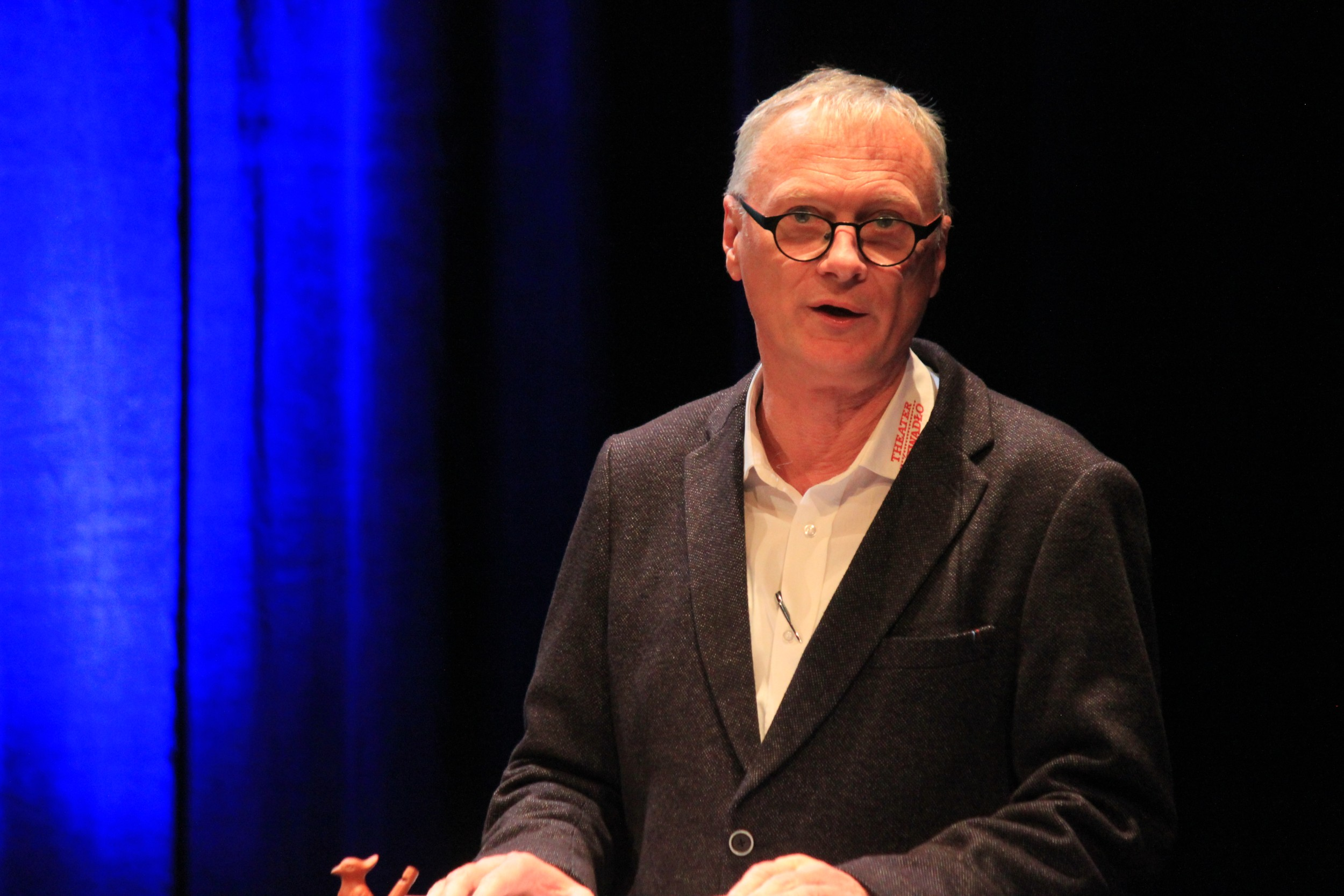 Hornjoserbsce: Intendant Němsko-serbskeho ludoweho dźiwadła, Lutz Hillmann.